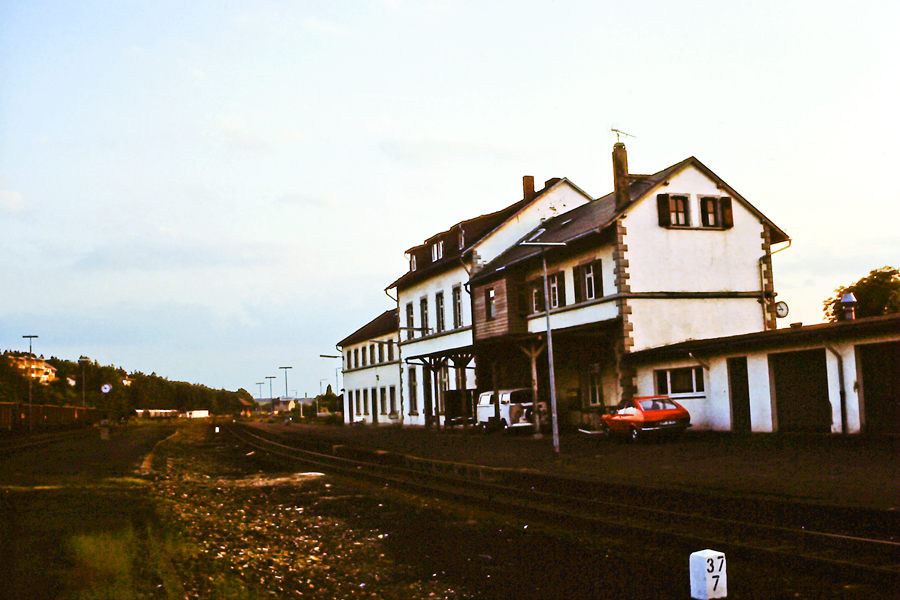 stillgelegter Bahnhof Simmern/Hunsrück, 1986